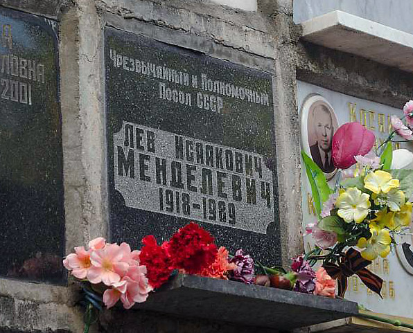 Место захоронения видного советского дипломата Л. И. Менделевича на Новом Донском кладбище